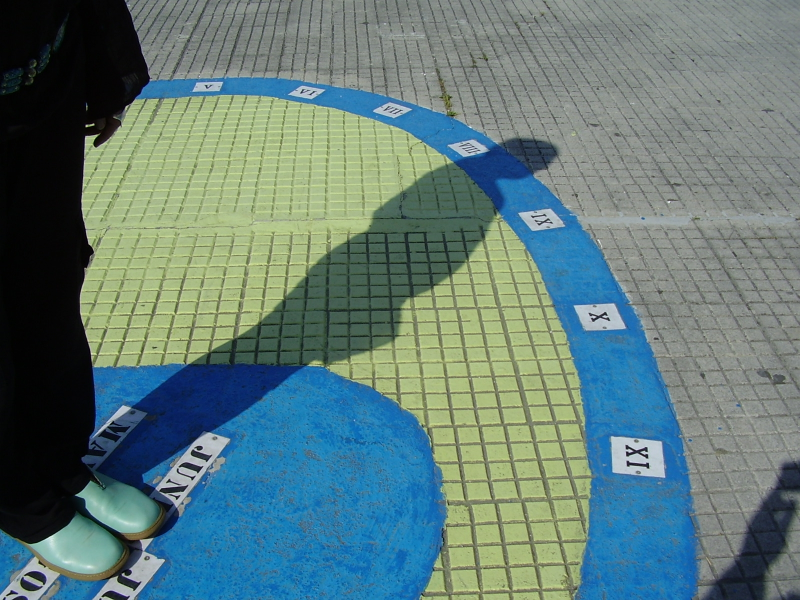 Reloj de Sol Analemático. RPLl2006